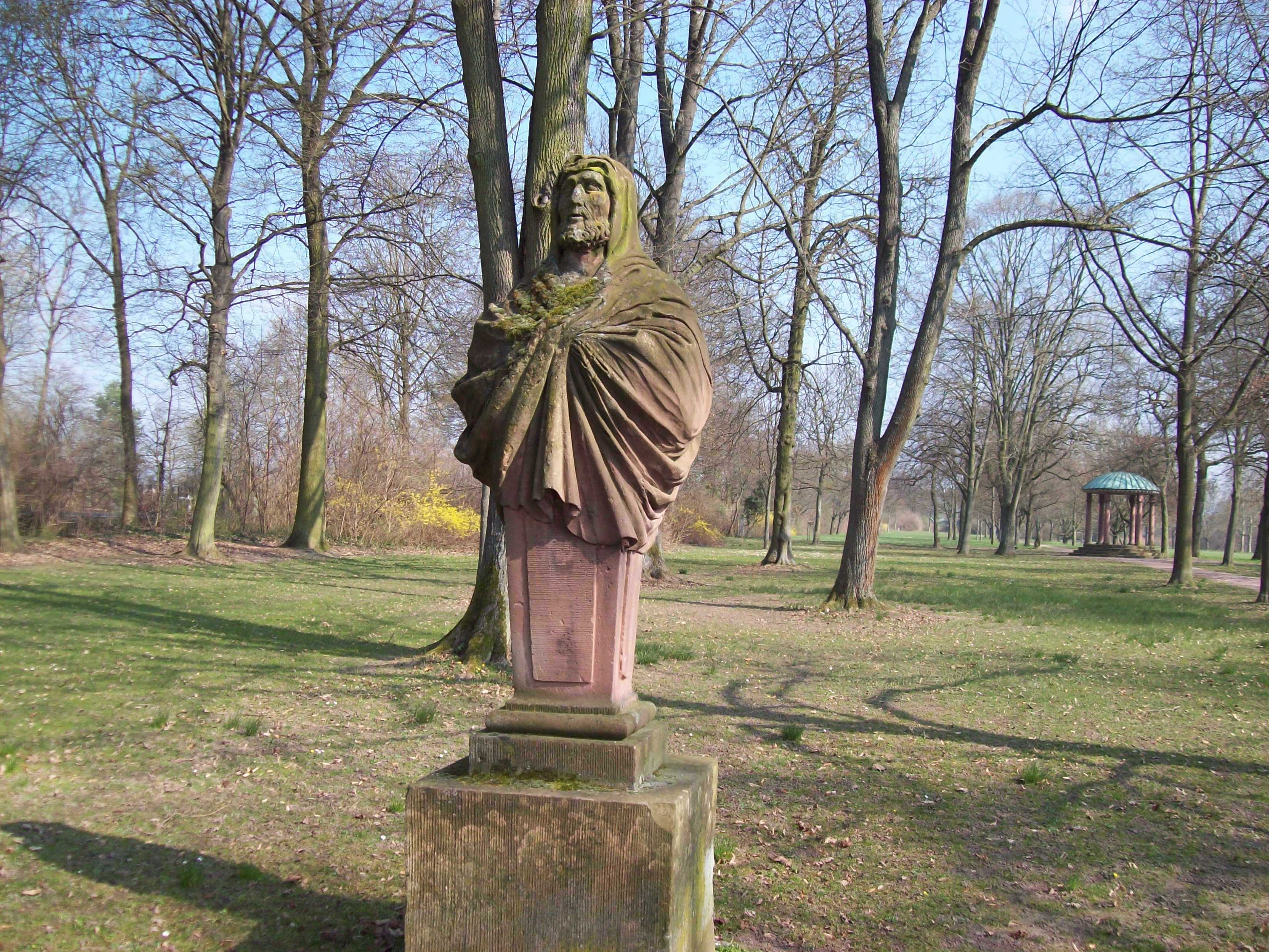 Steinplastik Anfang den 19. Jahrh. im klassischen Stil errichtet von Gutsbesitzer v.Mergenbaum.